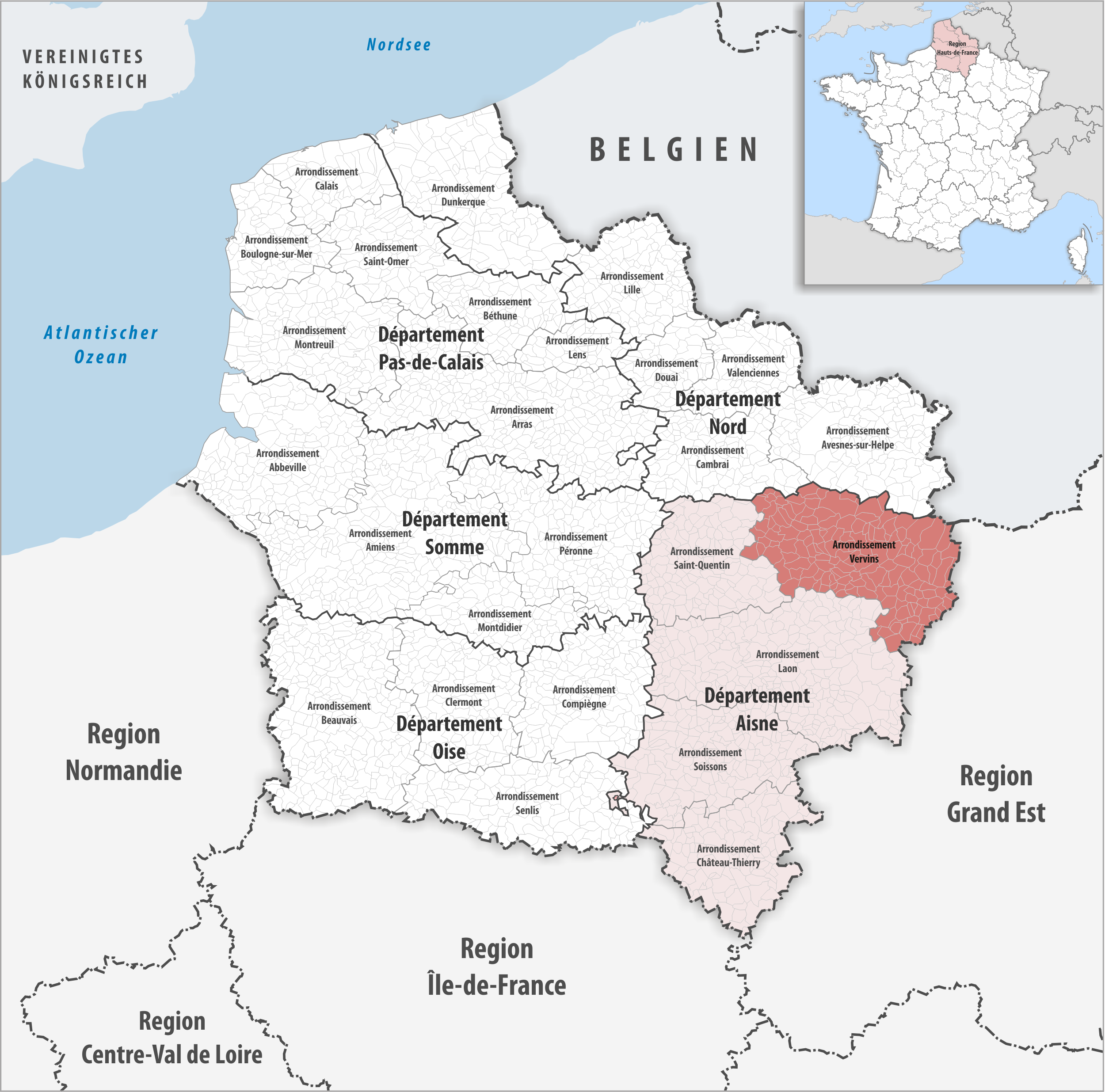 Lage des Arrondissements Vervins